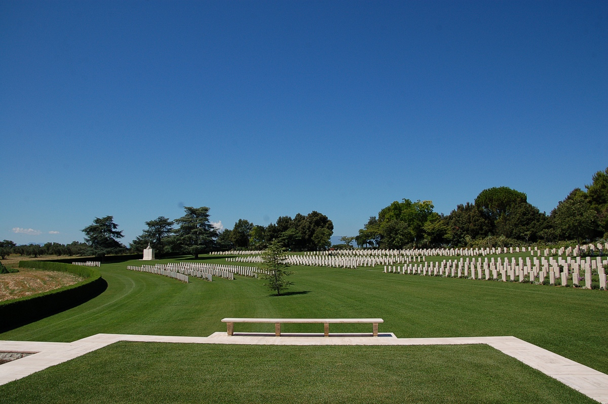 Der englische Soldatenfriedhof Torino am Fluss Sangro bei Ortona